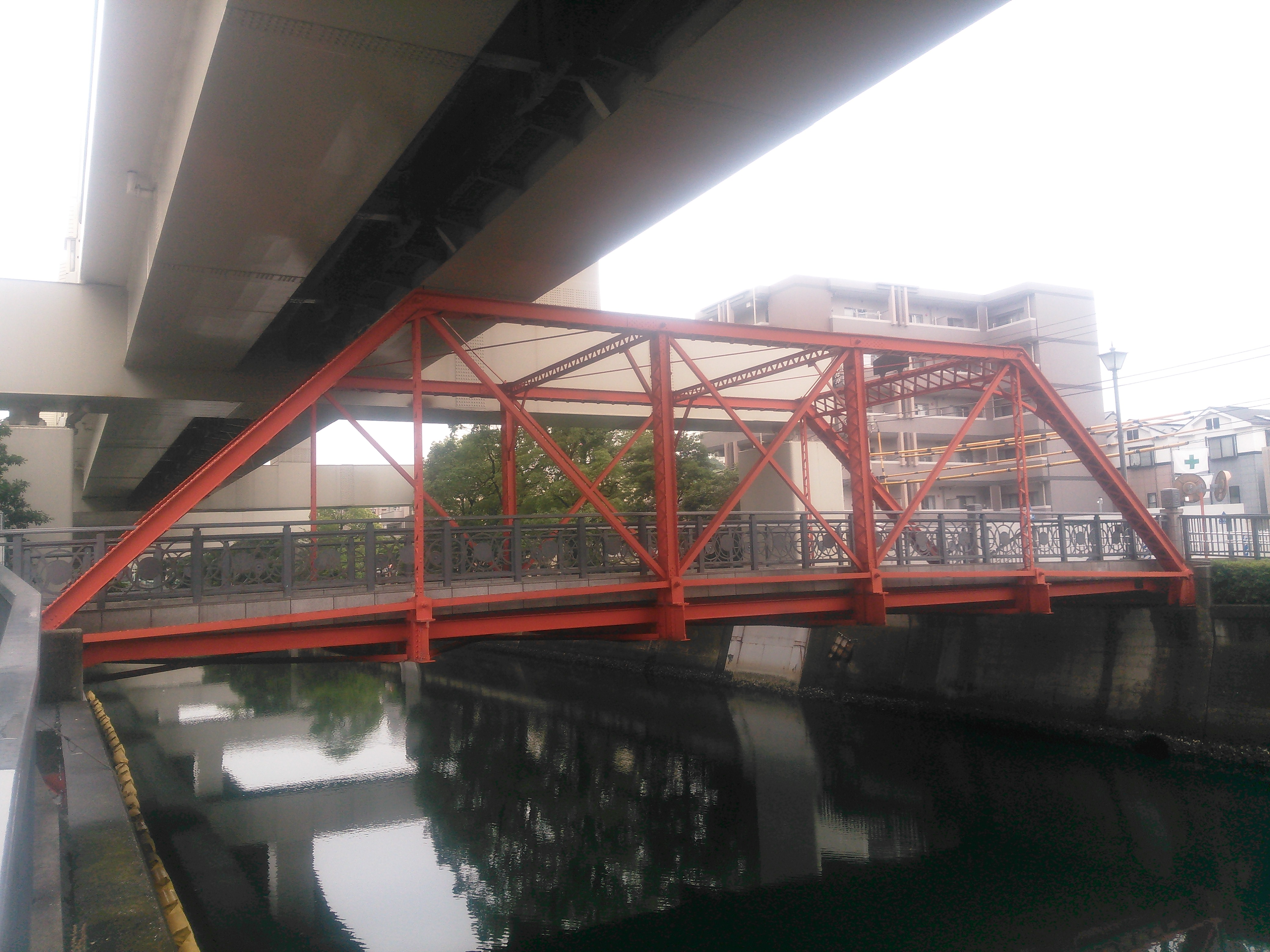 横浜市南区、浦舟水道橋